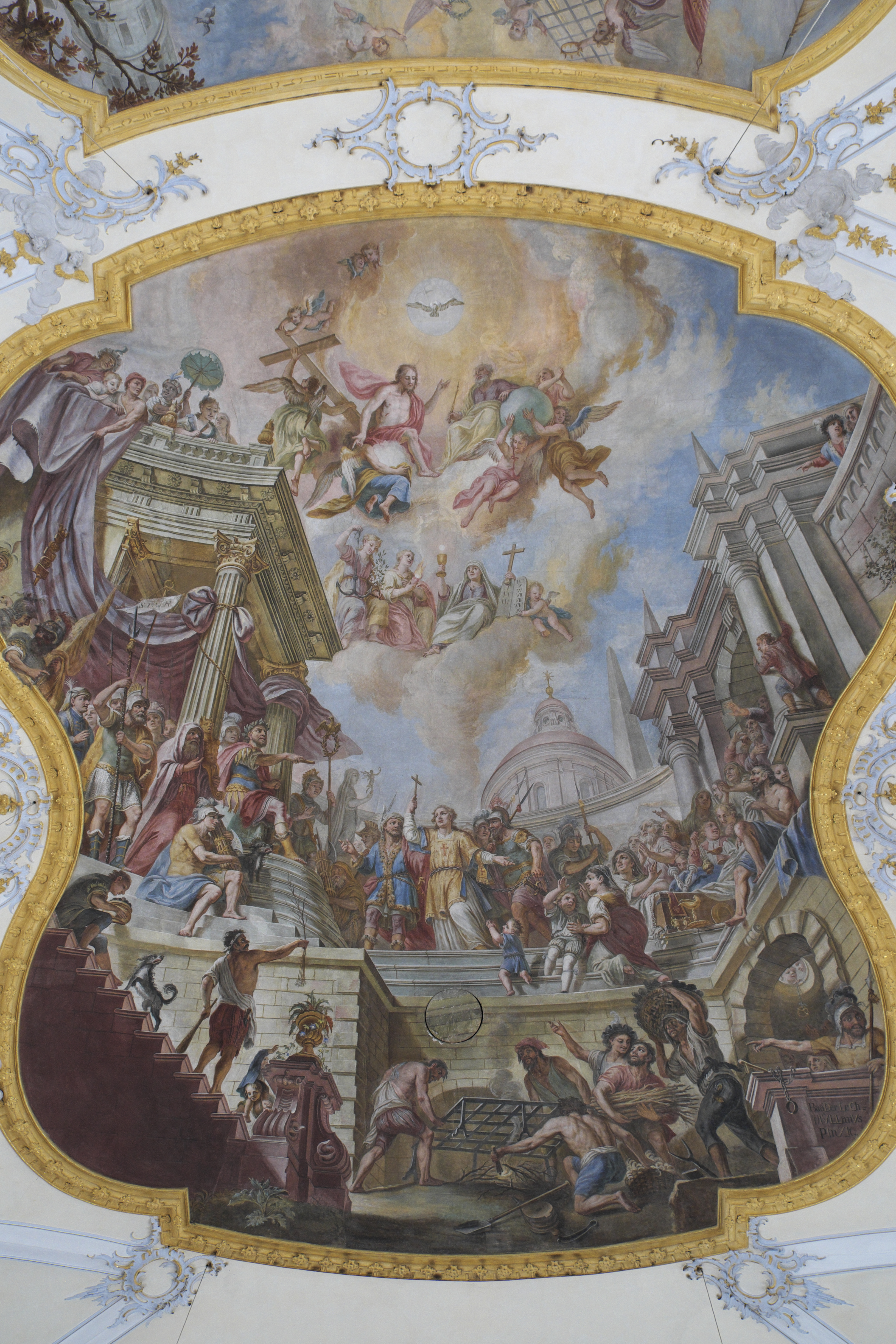 Katholische Pfarrkirche St. Laurentius in Pähl im Landkreis Weilheim-Schongau (Bayern/Deutschland), Deckenfresken von Johann Baptist Baader, von 1772; Langhausfresko: Laurentius vor Kaiser Valerian